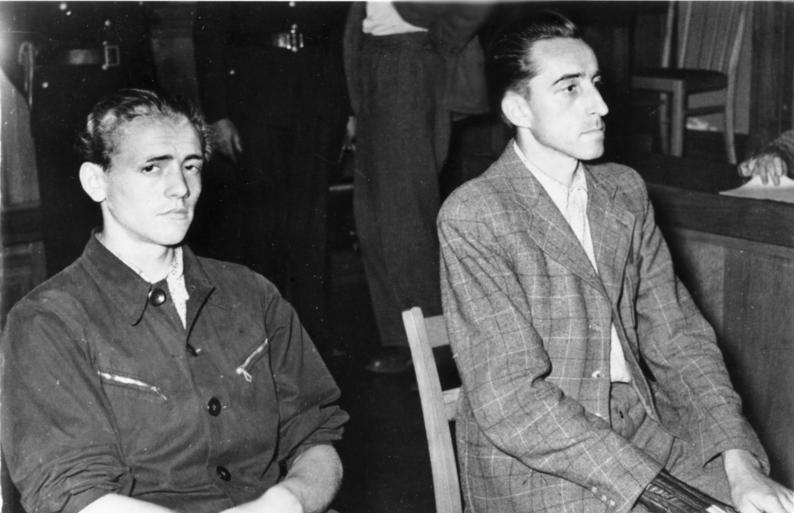 This description has been identified as biased or incorrect: SED biasADN-ZB/Braun 14.7.1953 Görlitzer Provokateure erhielten gerechte Strafe Im Prozeß gegen fünf Angeklagte , die maßgeblich an den faschistischen Umtrieben in Görlitz beteiligt waren, wurden am 10. Juli 1953 das Urteil gesprochen. Die Angeklagten Egon Gericke (links) , Körperverletzung und Landesfriedensbuch, ein Jahr und neuen Monate Gefängnis; Werner Herbig, fünf Jahre Zuchthaus.